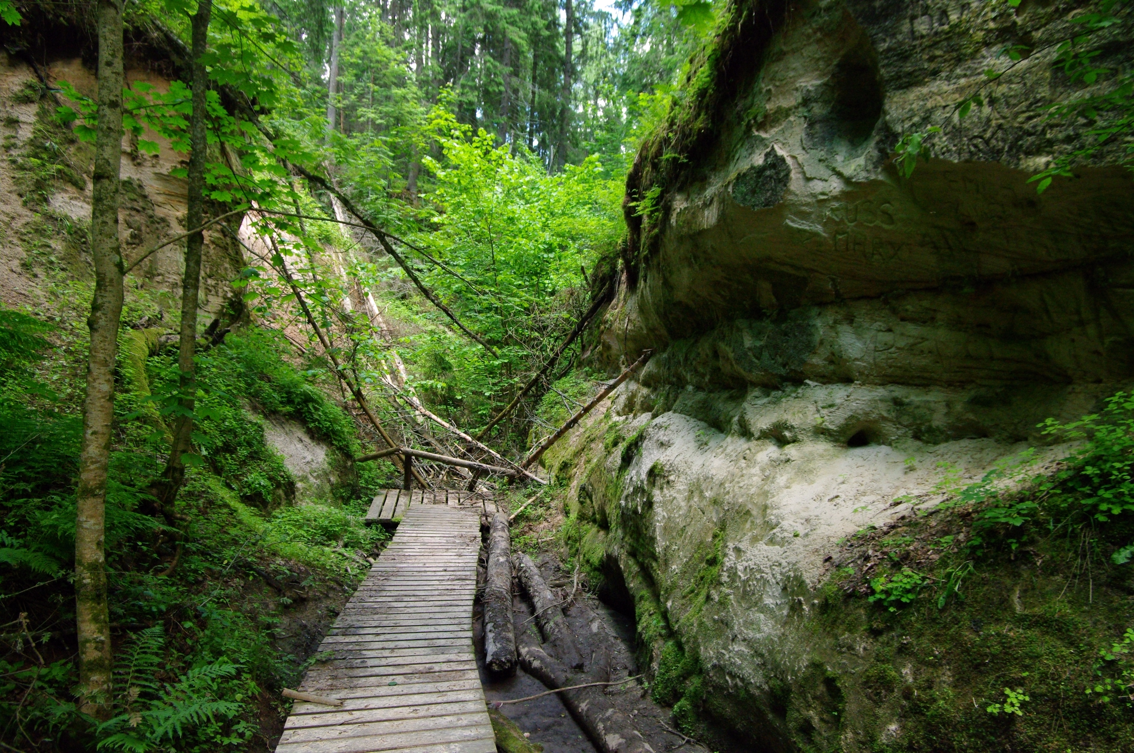 Hinni kanjon, Gauja lademe liivakivis